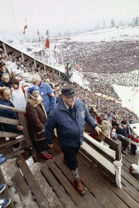 King Olav V in Holmenkollbakken